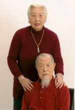 劉舜元將軍96歲（2010）與夫人張厭非。